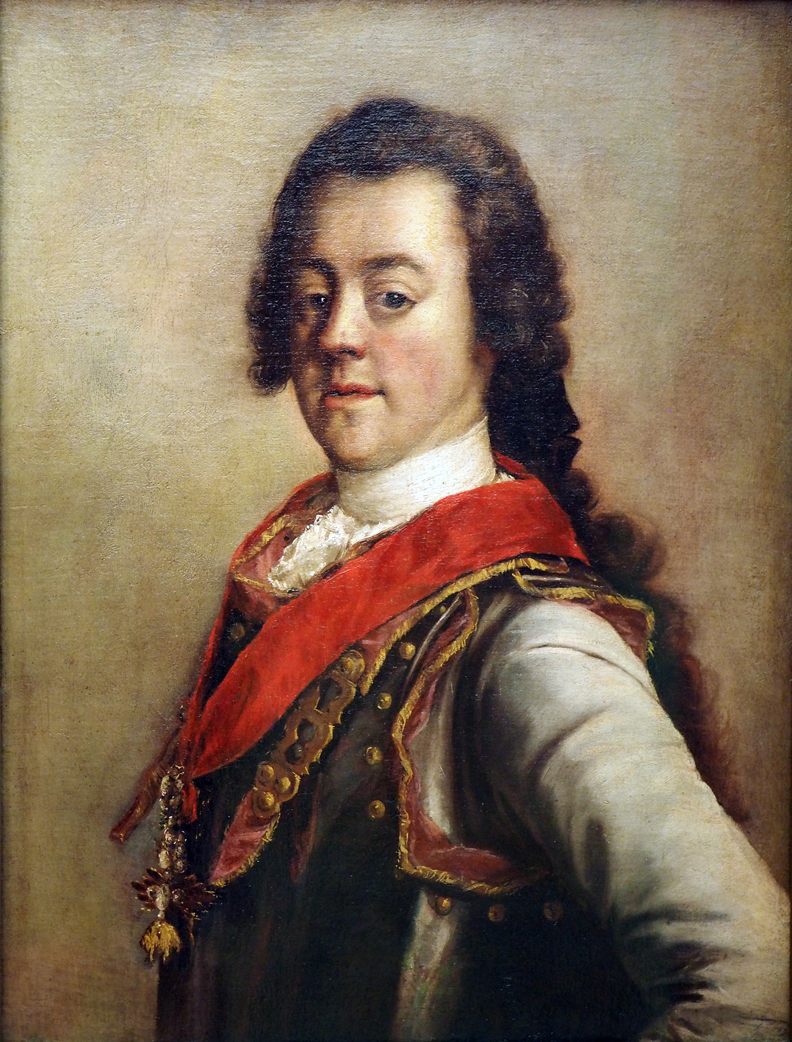 Herzog Karl Alexander von Lothringen (1712-1780) ist hier als Ritter des weltlichen Ordens vom Goldenen Vlies zu sehen, dessen Mitglied er seit 1729 war.